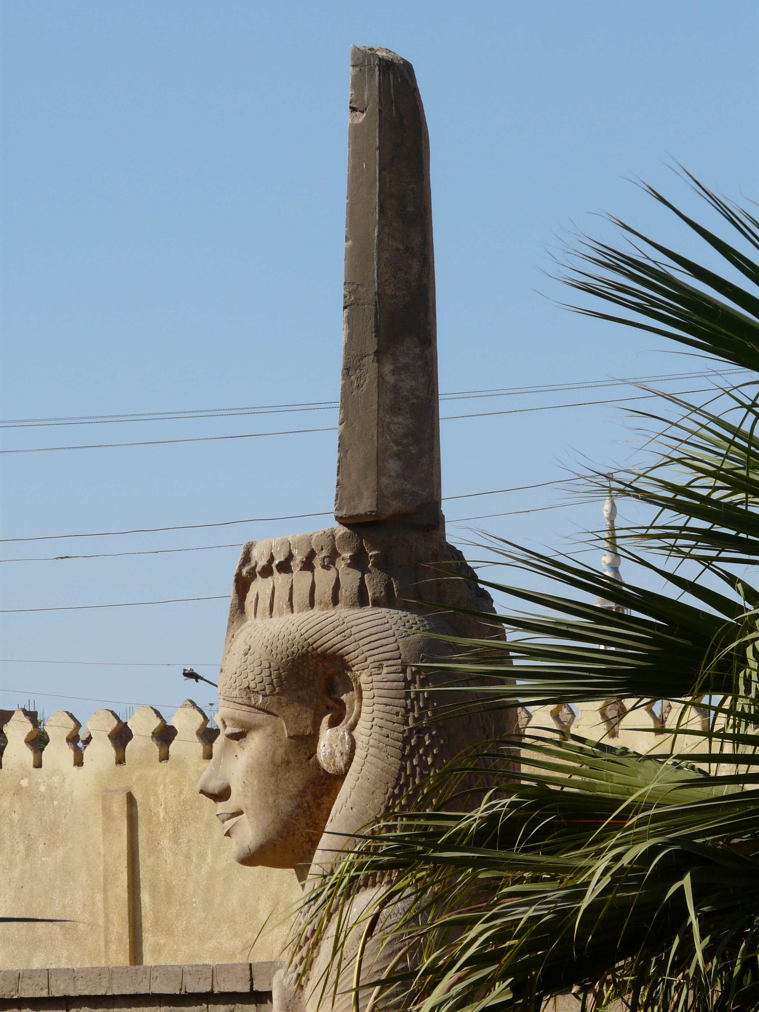 Akhmim - Statue colossale de Meritamon, fille de Ramsès II, visage vu de côté